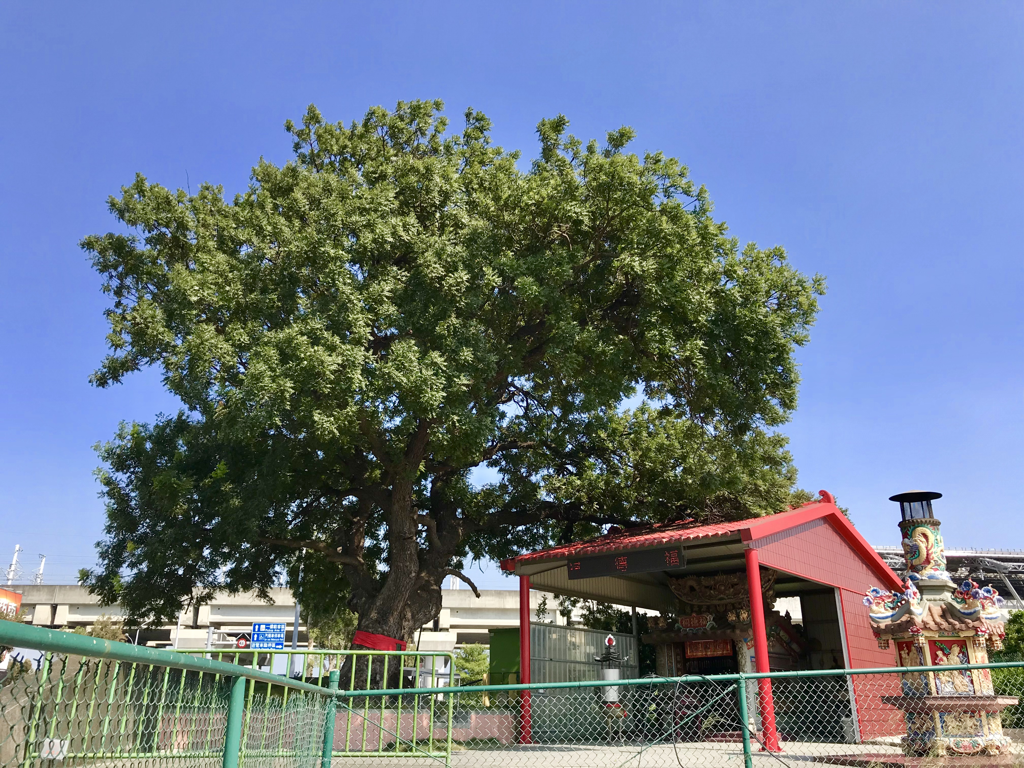 中文（台灣）: 厝仔福德祠與黃連木遠景